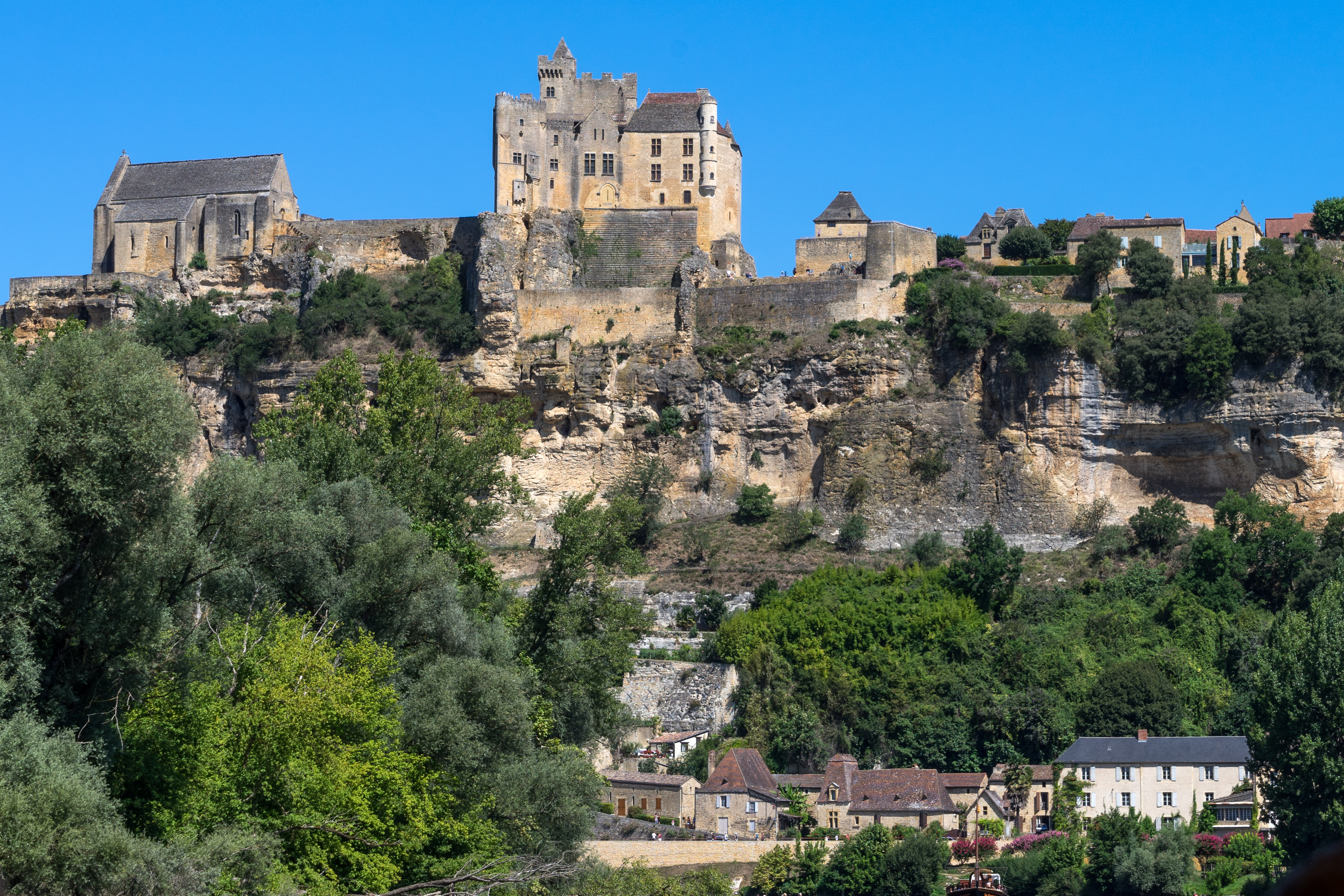 Beynac - Château vu de la Dordogne